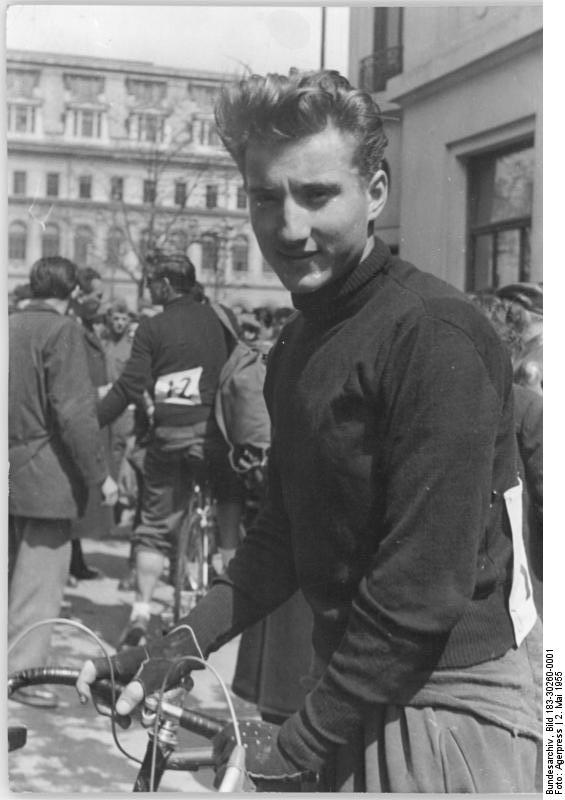 Constantin Dumitrescu Zentralbild Agerpres-IX 2.5.1955 - Die Fahrer der rumänischen Mannschaft, die an der VIII. Internationalen Friedensfahrt Prag - Berlin - Warschau teilnehmen. UBz: Constantin Dumitrescu.